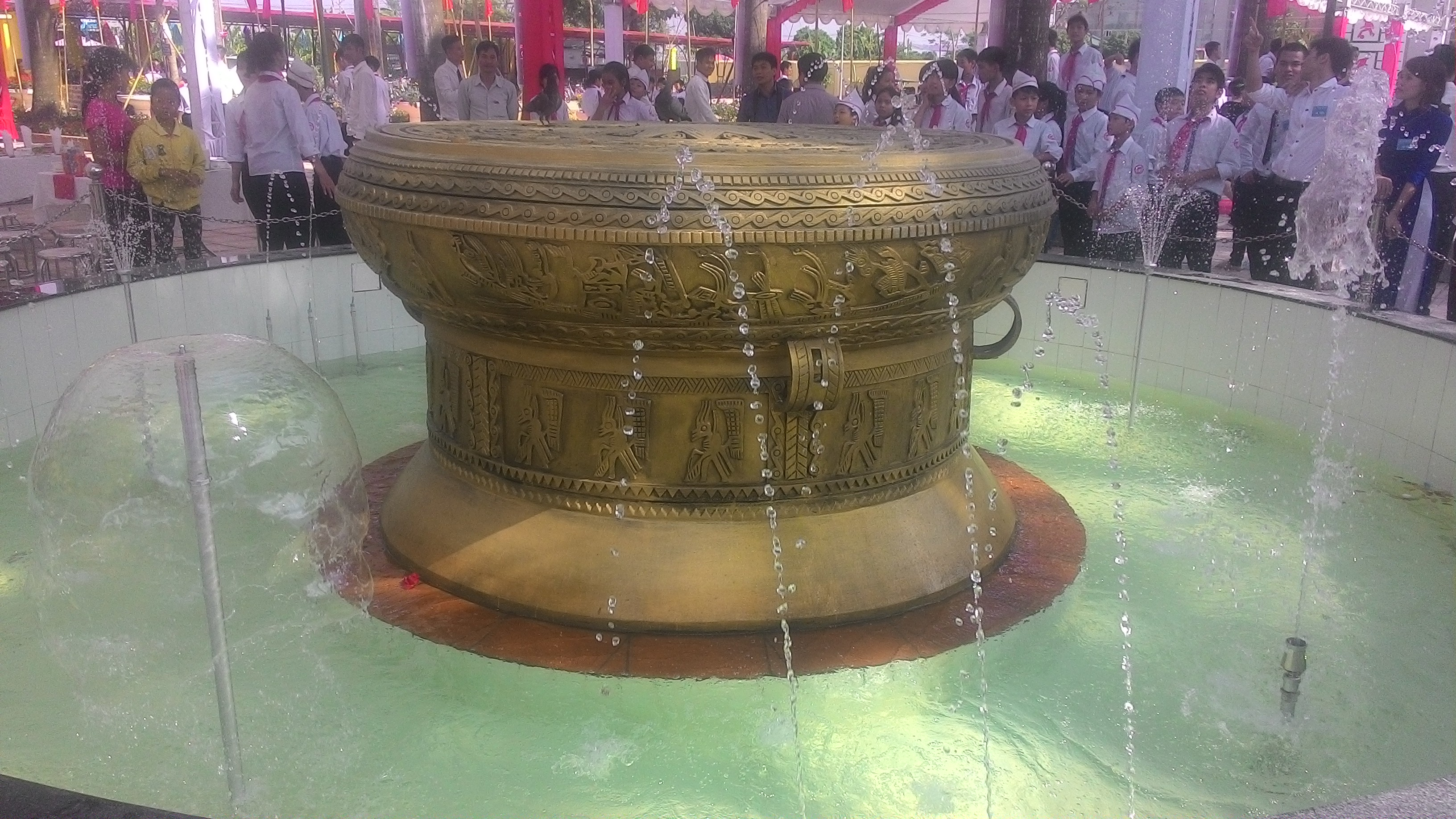 Hình ảnh đài phun nước, giữa đài là hình ảnh trống đồng Đông Sơn quen thuộc với nhiều thế hệ người Việt Nam.